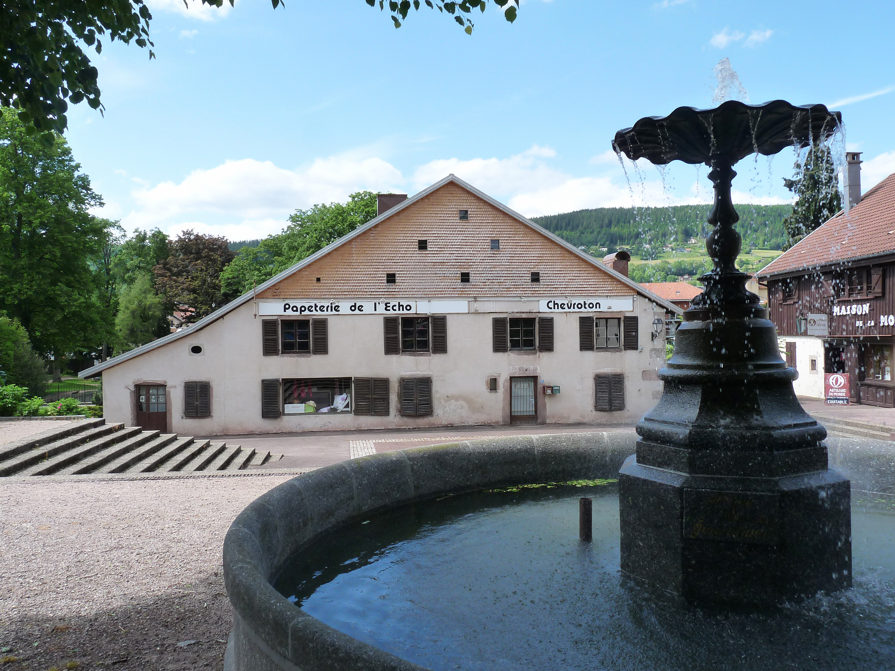 Gérardmer (Vosges) , 3 place de l'Eglise : ferme ancienne dite Immeuble Chevroton. Date : 1783. Inscrite aux Monuments historiques